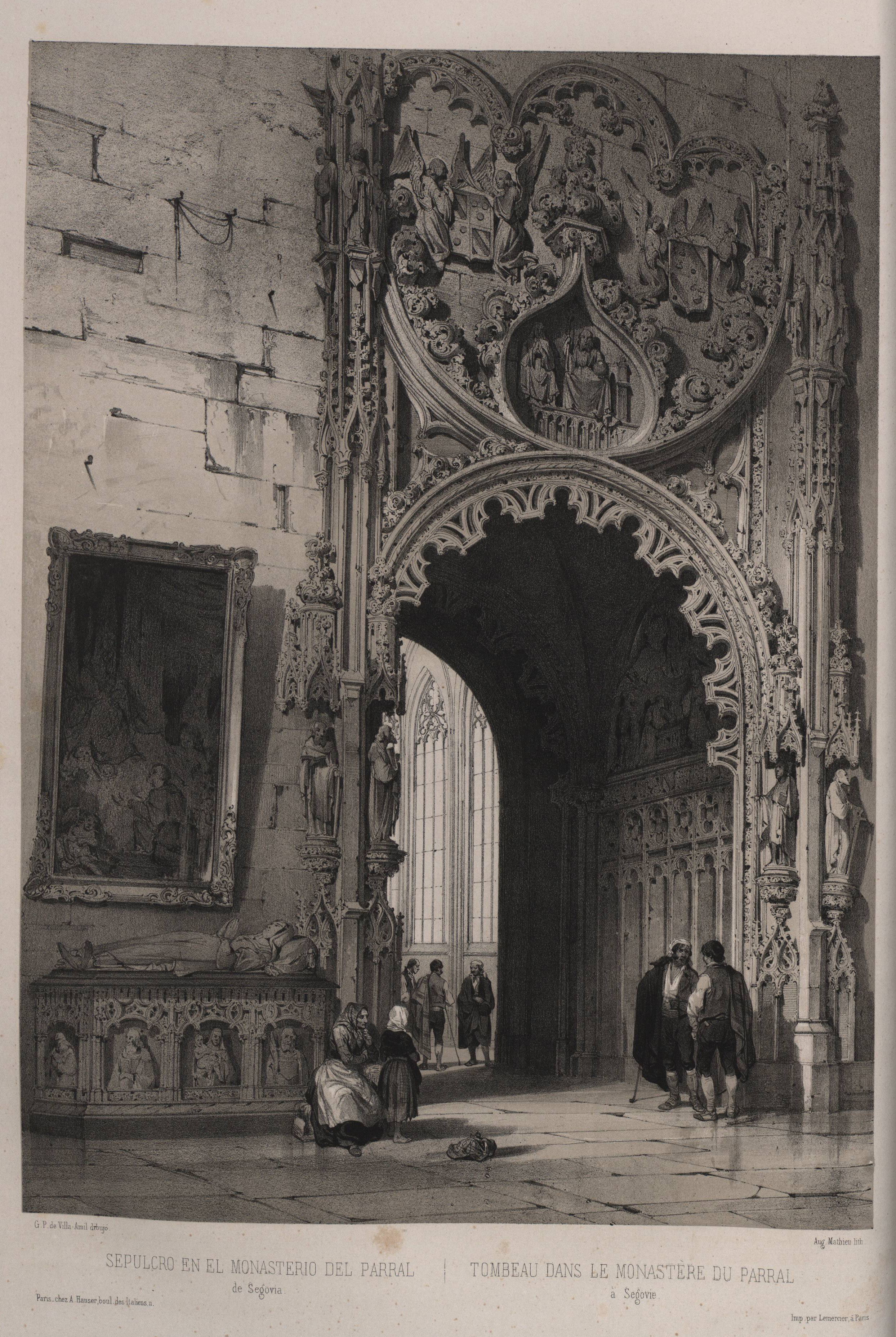 Sepulcer of the monastery del Parral in Segovia (in Spain), in España artística y monumental.